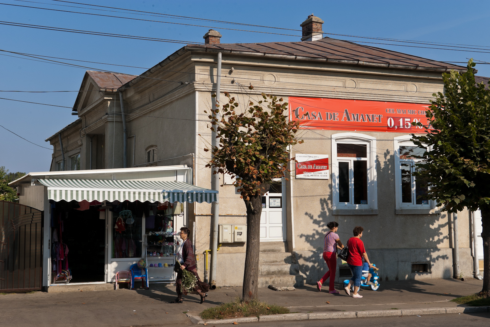 Fotografia prezinta casa de pe str. Crinului 13, vazuta dinspre SE.